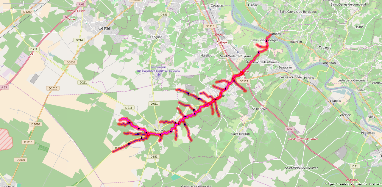 Le Saucats (affluents) This map may be incomplete, and may contain errors. Don't rely solely on it for navigation.